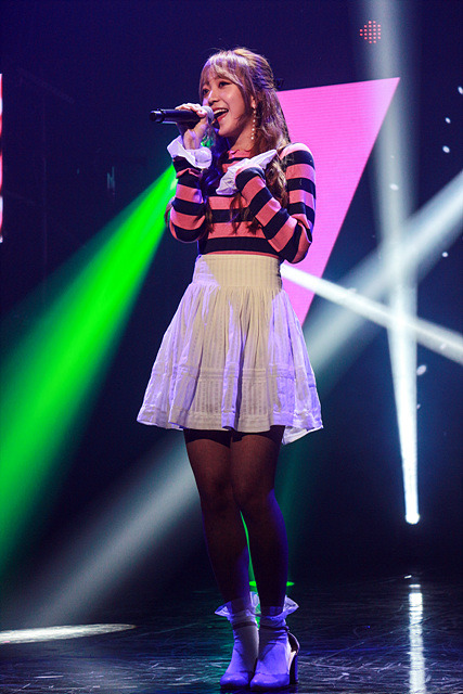 09월 26일 뮤콘 쇼케이스 MUCON Showcase 김소희